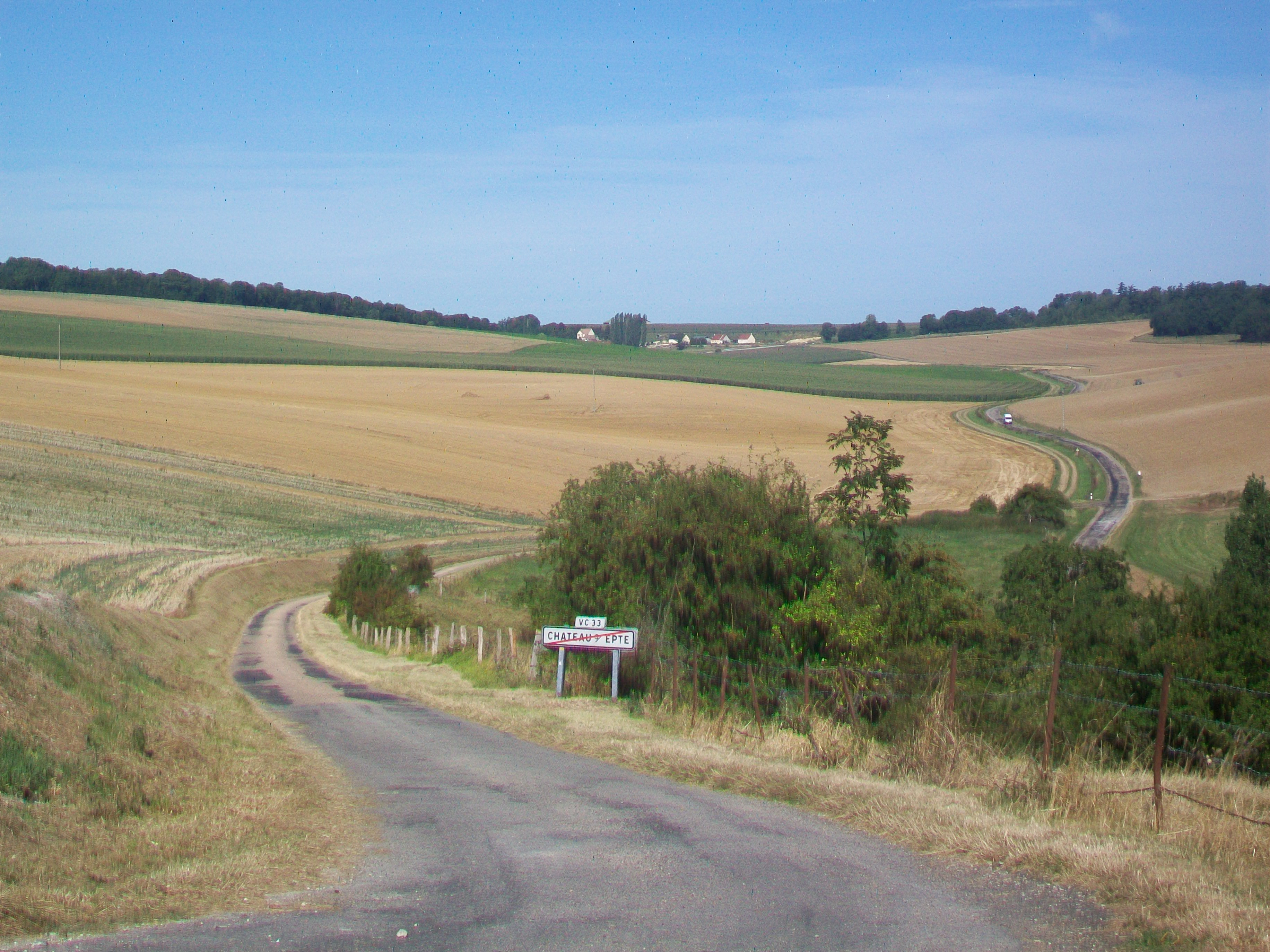 La sortie ouest du village par la voie communale n° 33 vers Cahaignes.